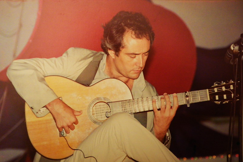 Фото Жан Авi.